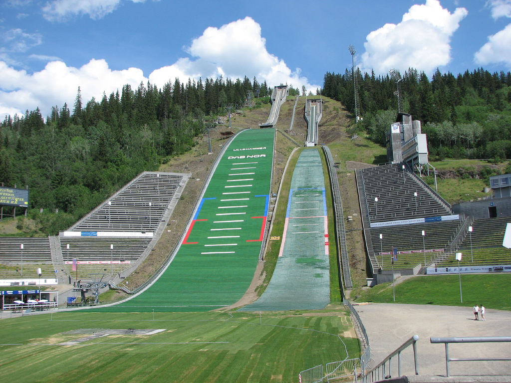 Lysgårdsbakken ski jumping hill in Lillehammer, Norway.